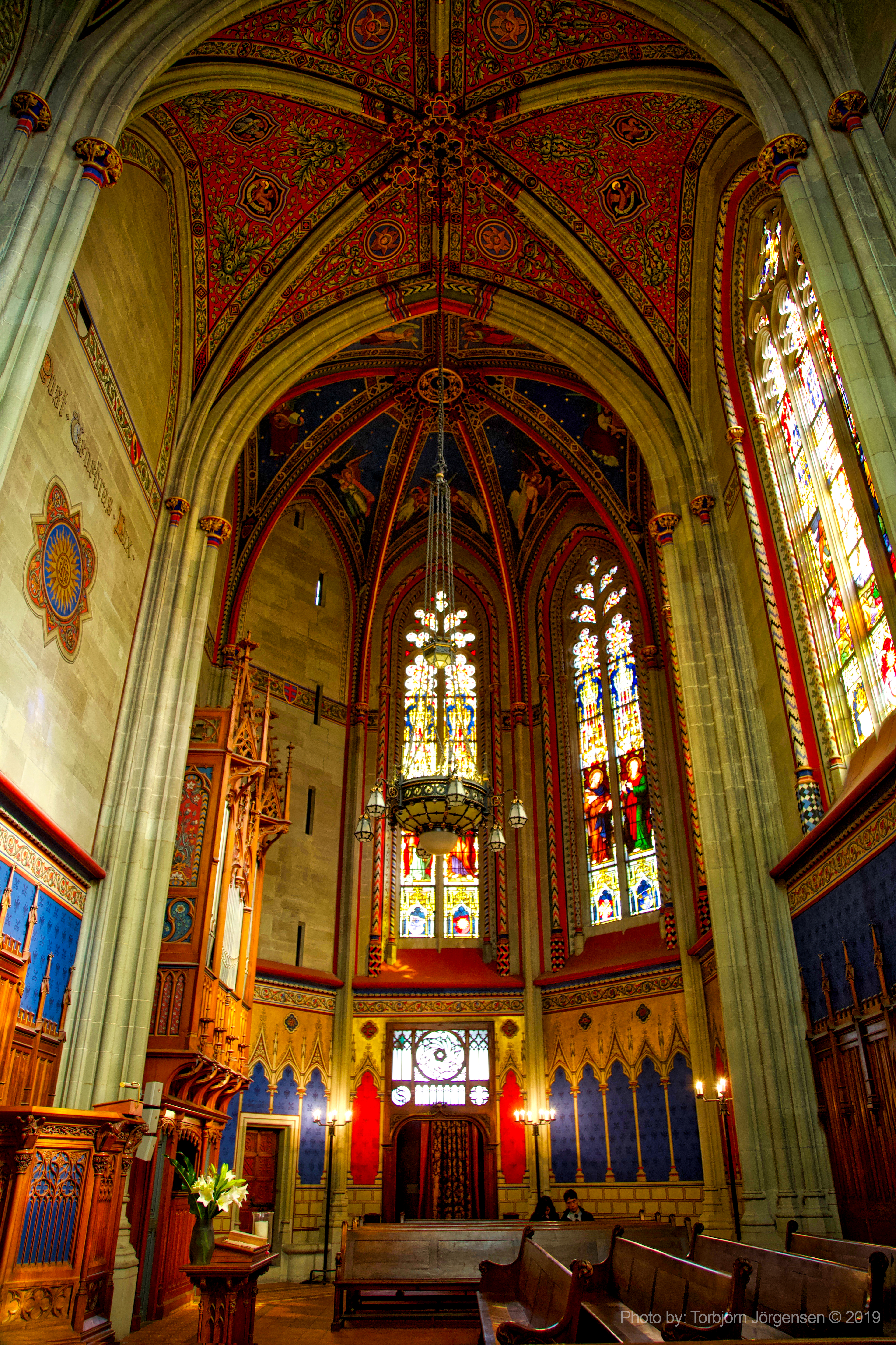 Chapelle des Macchabées, Geneva